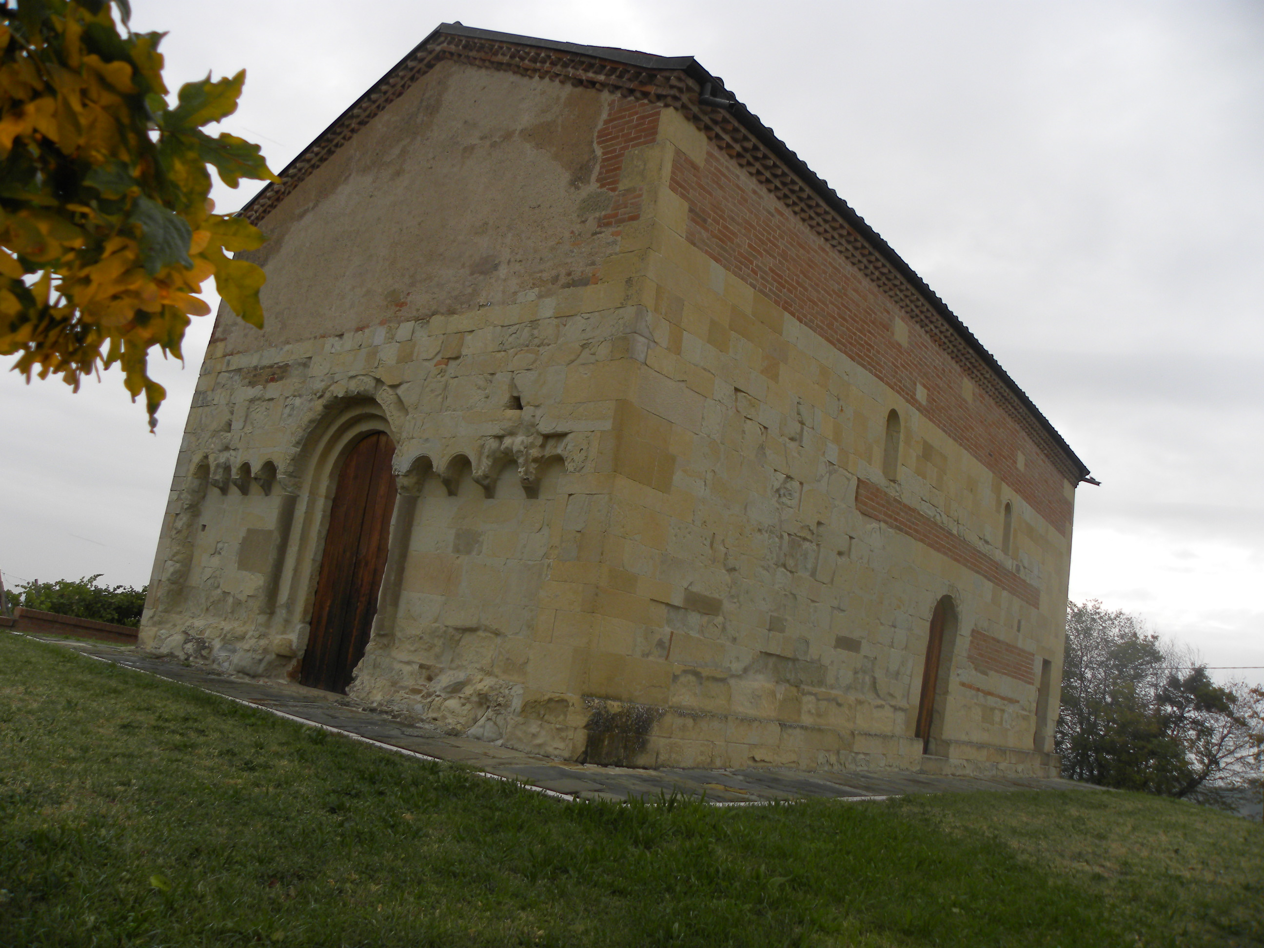 Oratorio San Michele - MIBAC This is a photo of a monument which is part of cultural heritage of Italy.